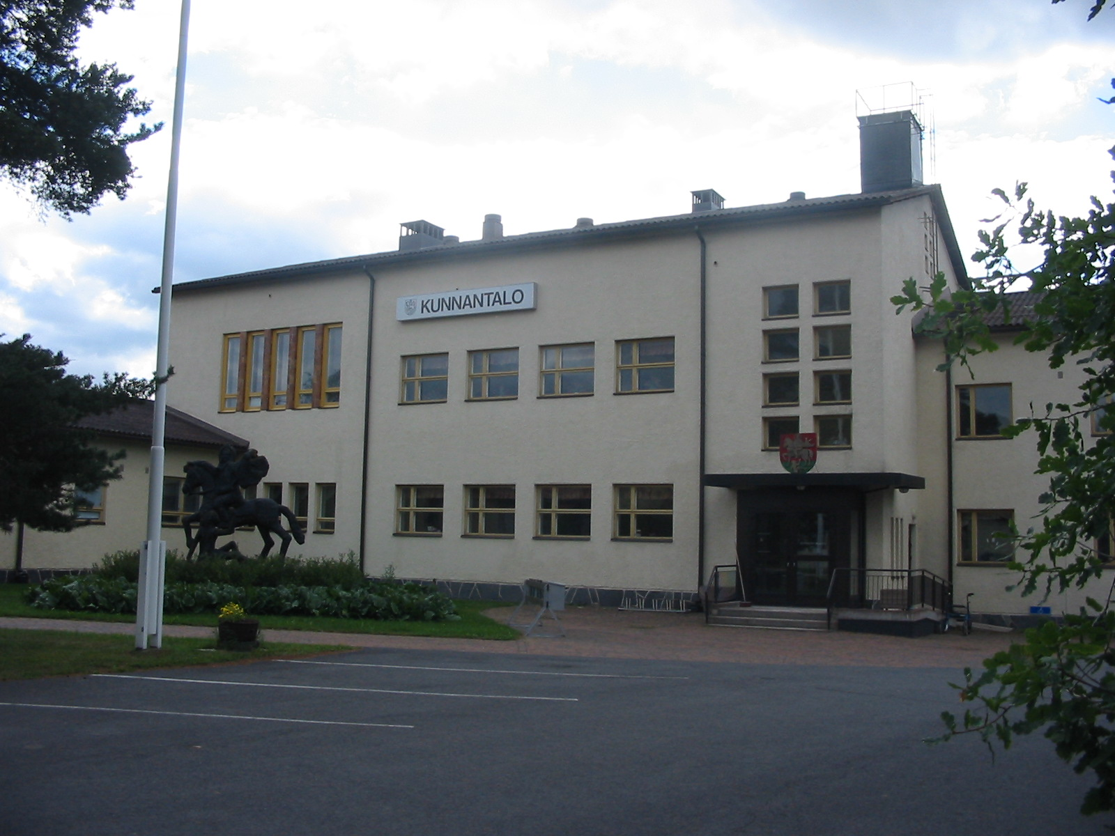 Marttilan kunnantalo. Rakennuksen edustalla Arto Ali-Eskolan kunnan vaakunaan pohjautuva veistos.